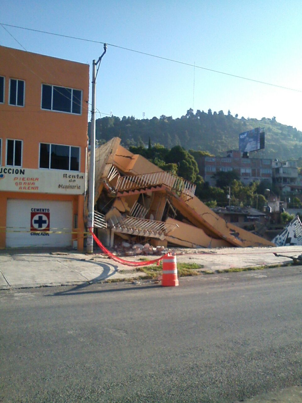 Derrumbe de un edificio comercial sobre Bulevar Revolución Norte.